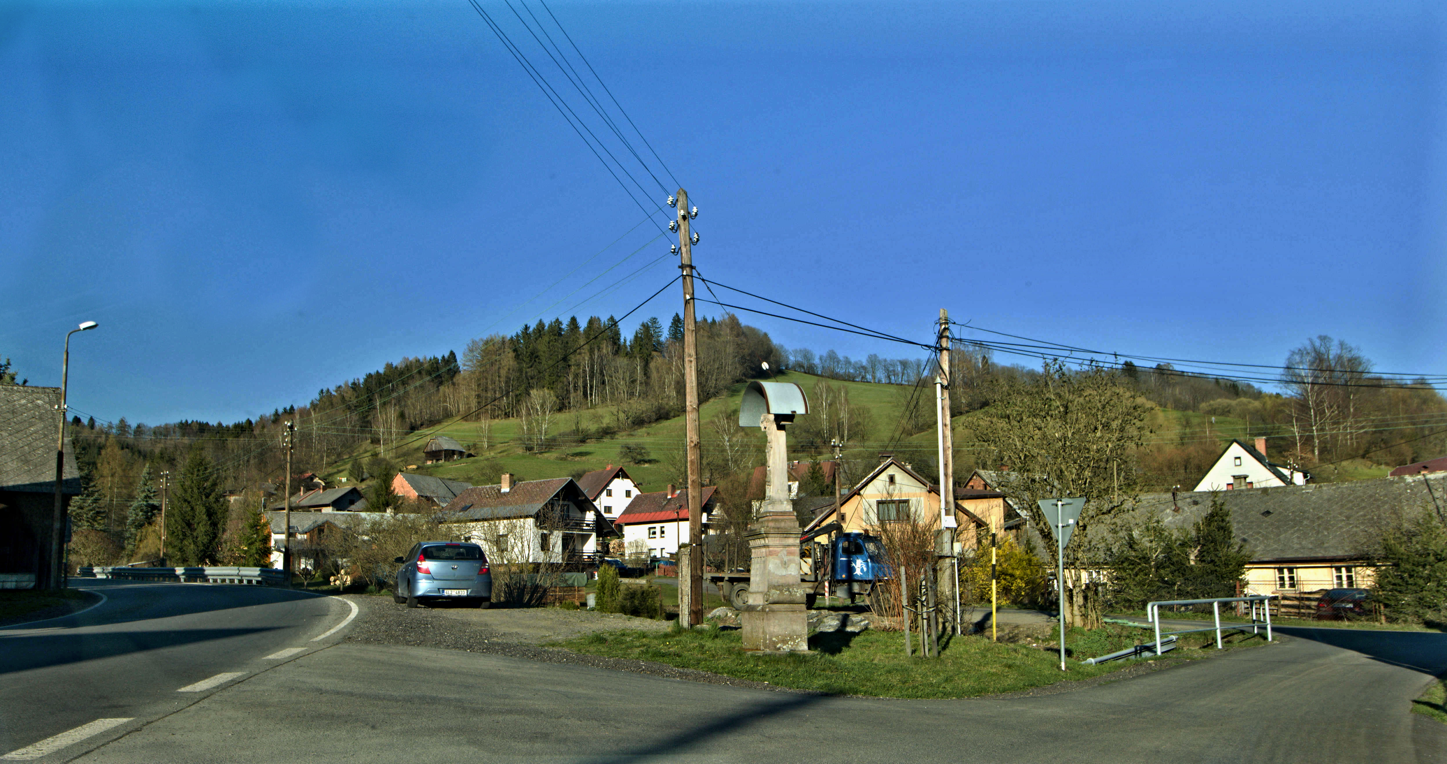 Dolní Štěpanice